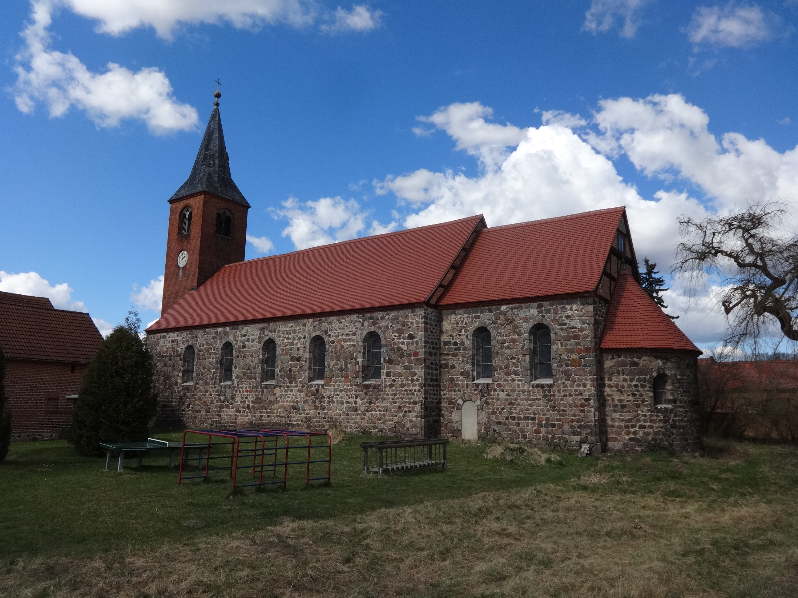 Die Dorfkirche Buckau entstand um 1200 als romanischer Feldsteinbau mit Chor und Apsis. Der neoromanische Backsteinturm wurde um 1860 angebaut. Im Innern befinden sich ein gotischer Schnitzaltar aus der Zeit um 1420 sowie eine Holzfigur der Mutter Gottes, die um 1390 entstand. Als Stufe zum Altar dient ein Grabstein der Gertrudis, der rund 800 Jahre alt ist und damit als der älteste Grabstein der Mark Brandenburg gilt.